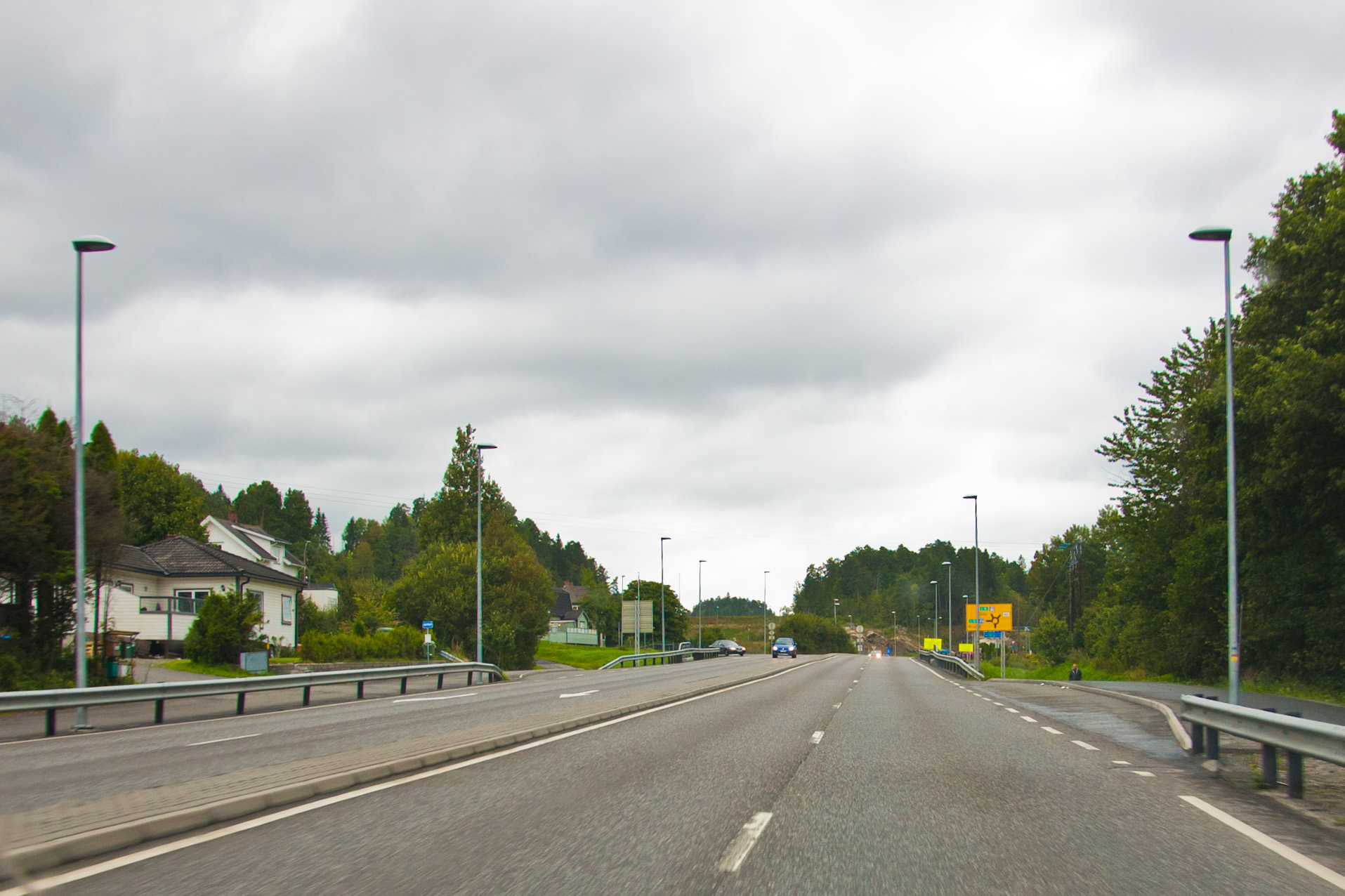 Riksvei 40 Lågendalsveien i Larvik